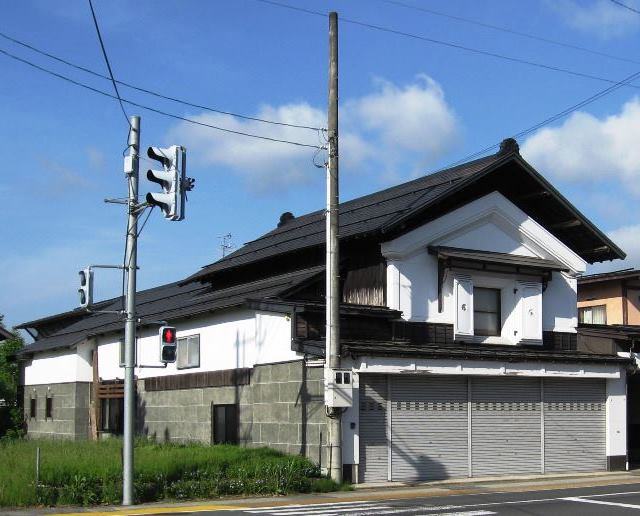 うろこや旧本店（山形県北村山郡大石田町本町）